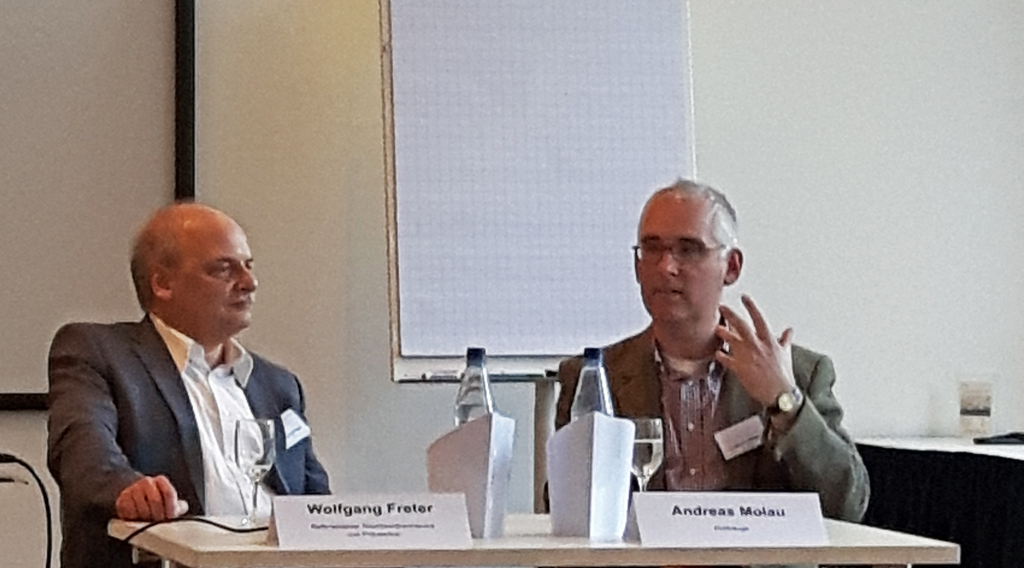 Andreas Molau (Politologe; rechts) und Wolfgang Freter (Referatsleiter Rechtsextremismus und Prävention, Verfassungsschutz Niedersachsen) referieren in einem Workshop des Symposiums über das Thema: Ausstieg aus der rechtsextremen Szene – Reintegration in die Gesellschaft!